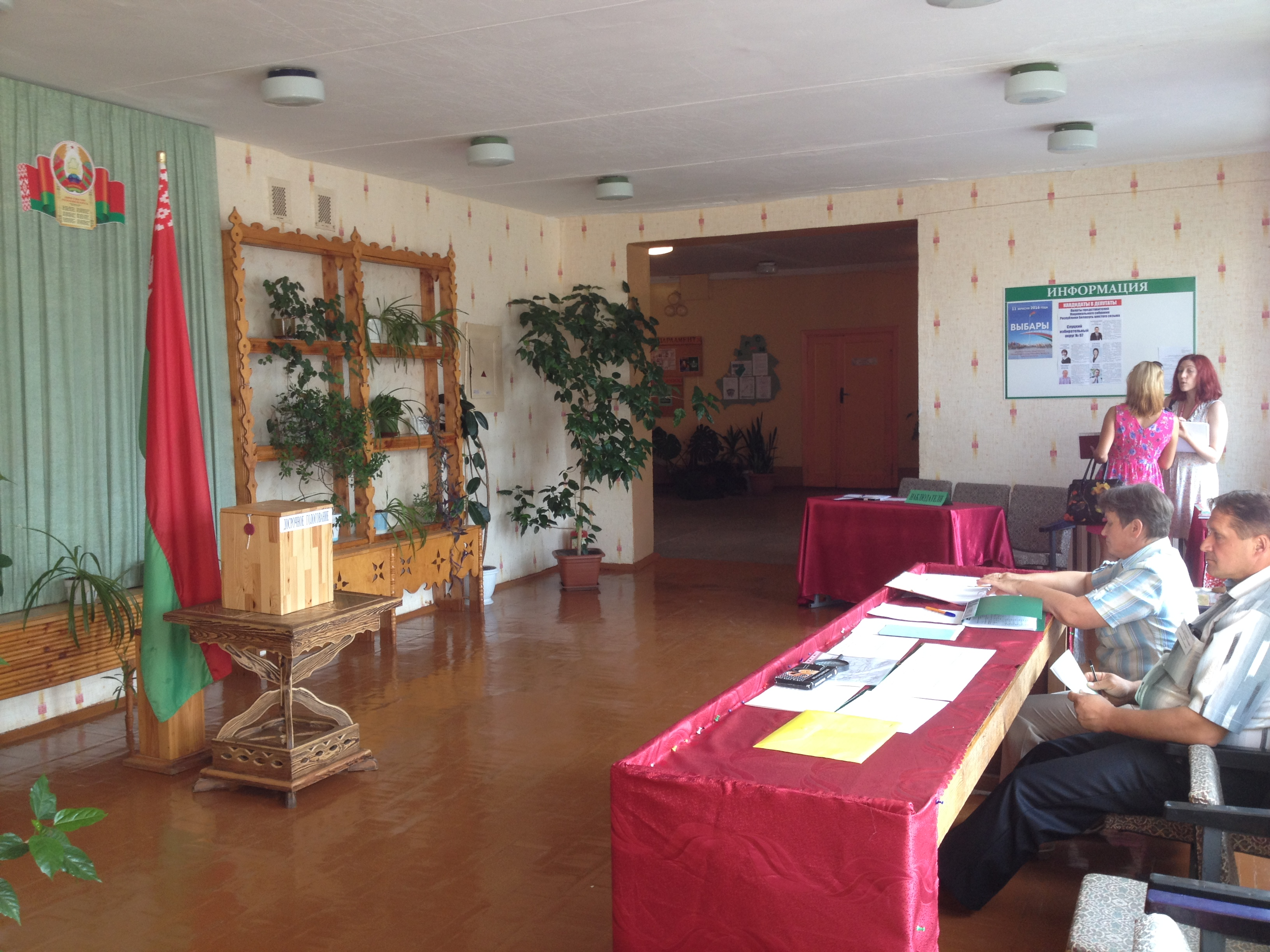 Wybory parlamentarne na Białorusi w 2016 roku.